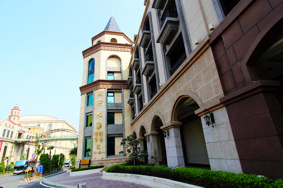 義守大學國際學舍二館外觀